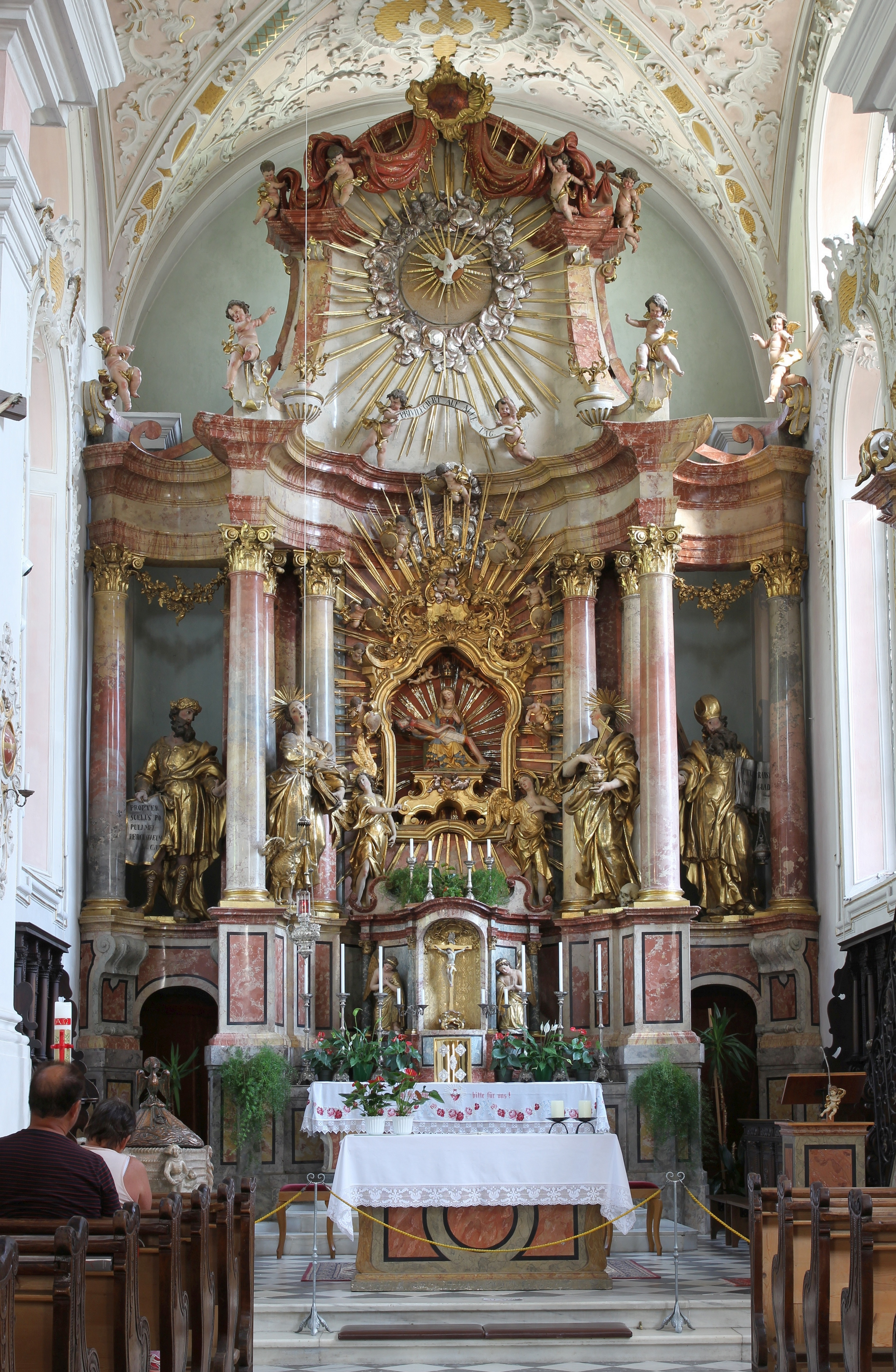 Pfarrkirche zur Schmerzhaften Muttergottes in Riffian (Südtirol): Innenraum